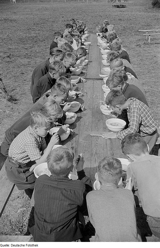 Original image description from the Deutsche Fotothek Kinder während des Essens an einer Holztafel im Freien